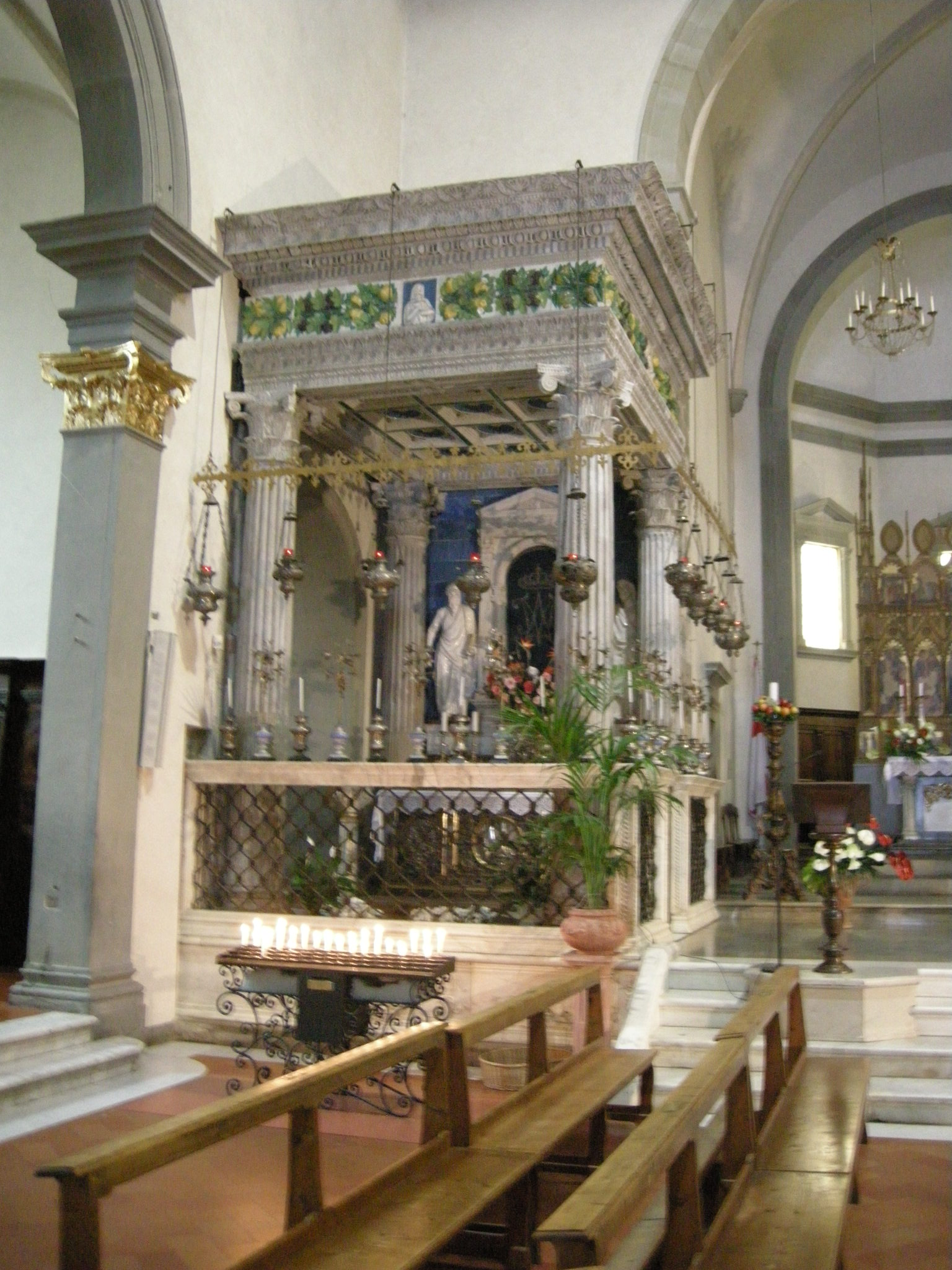 Santuario di Santa Maria dell'Impruneta, interno, tempietto della vergine, by michelozzo e luca della robbia